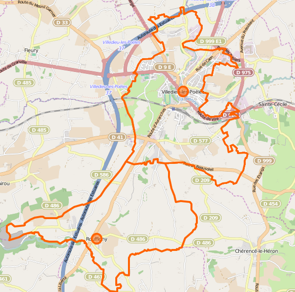 Carte de la commune nouvelle de Villedieu-Rouffigny et ses communes déléguées